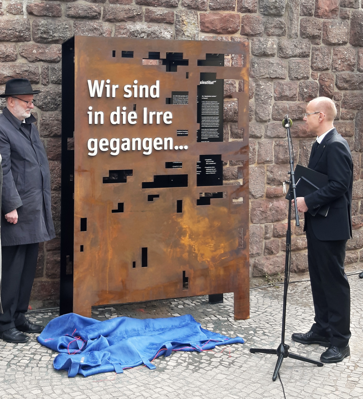 Enthüllung des Mahnmals am 6. Mai 2019 (v.l.n.r.: Initiator des Mahnmals und Kurator des Eisenacher Lutherhauses, Dr. Jochen Birkenmeier; Landesbischöfin der Evangelischen Kirche in Mitteldeutschland, Ilse Junkermann; Präses der Evangelischen Kirche in Hessen-Nassau, Dr. Ulrich Oelschläger; Kirchenpräsident der Evangelischen Landeskirche Anhalts, Joachim Liebig [verdeckt]; Karl W. Schwarz, Vertreter der Evangelischen Kirche Augsburgischen und Helvetischen Bekenntnisses in Österreich, der Dezernent für Theologische Grundsatzfragen der Evangelisch-Lutherischen Landeskirche Sachsen, Thilo Daniel, sowie Propst Thomas Drope von der Evangelisch-Lutherischen Kirche in Norddeutschland)